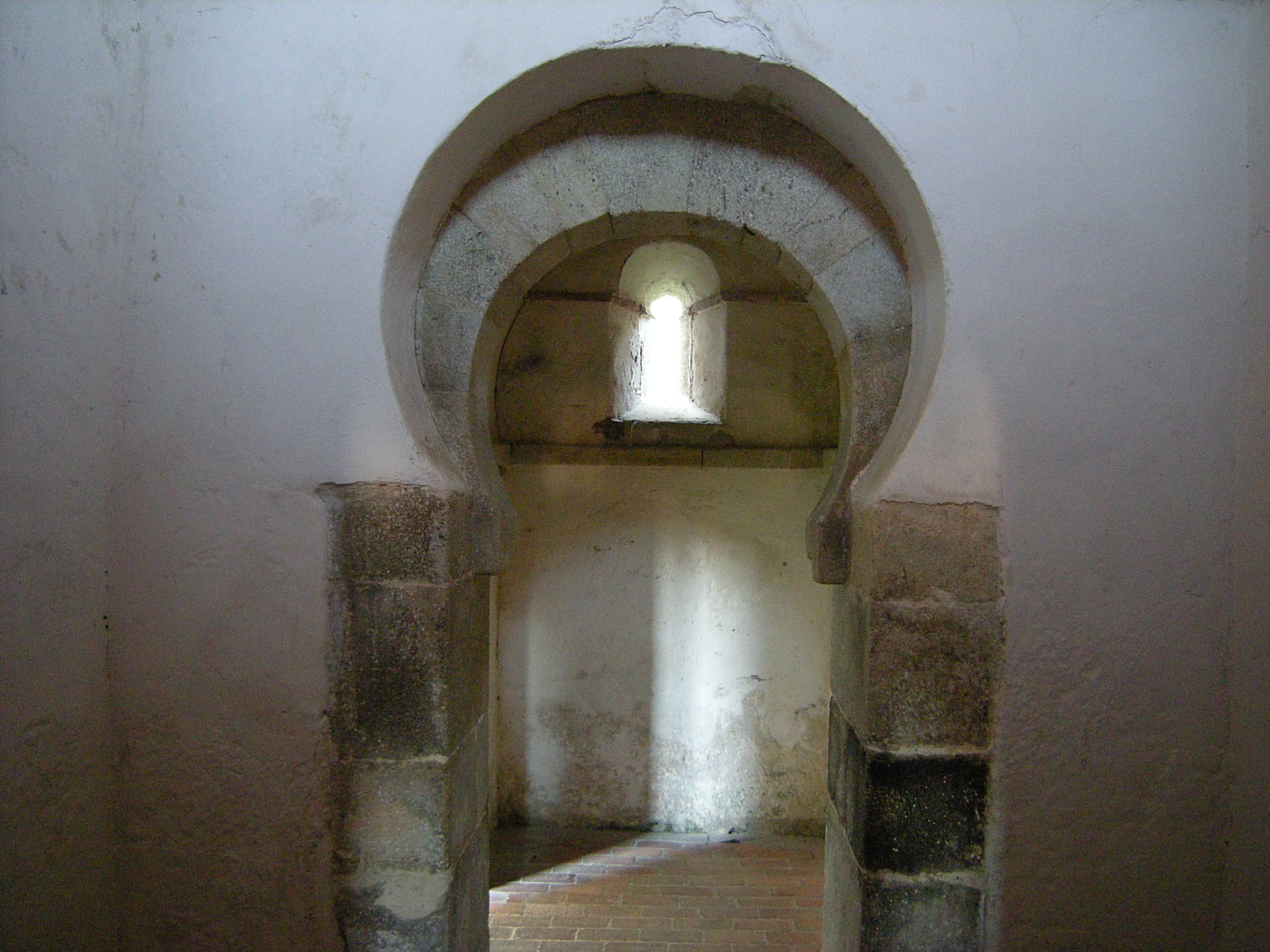 Capela mozárabe de san miugel - Celanova - Ourense. Interior